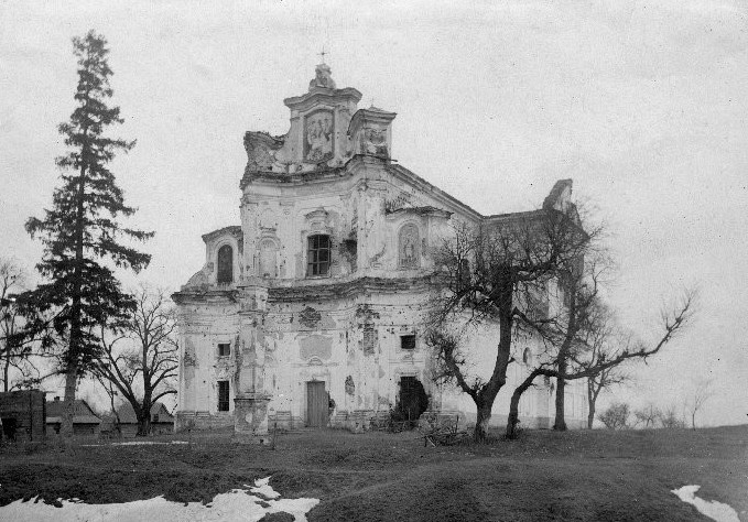 Румовища Домініканського костелу у Чорторийську.